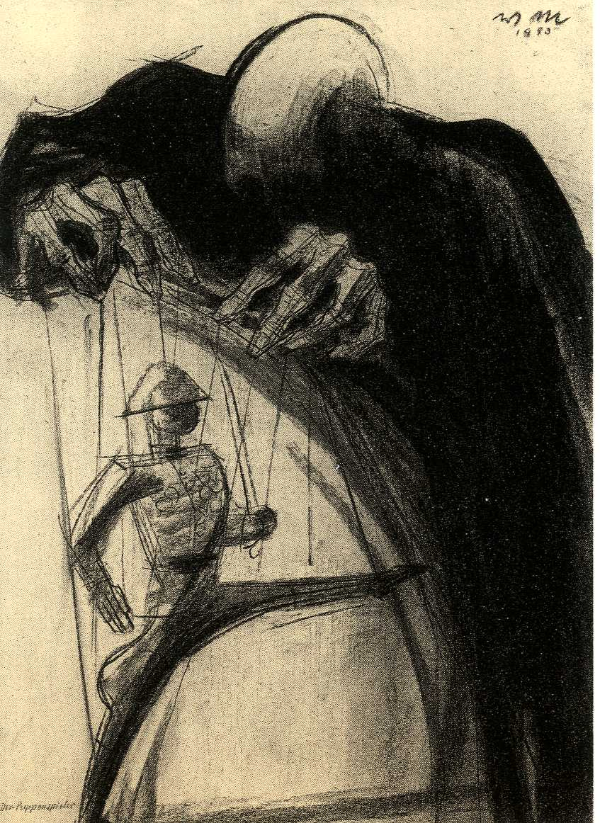 Der Puppenspieler (Kohlezeichnung, 1953)